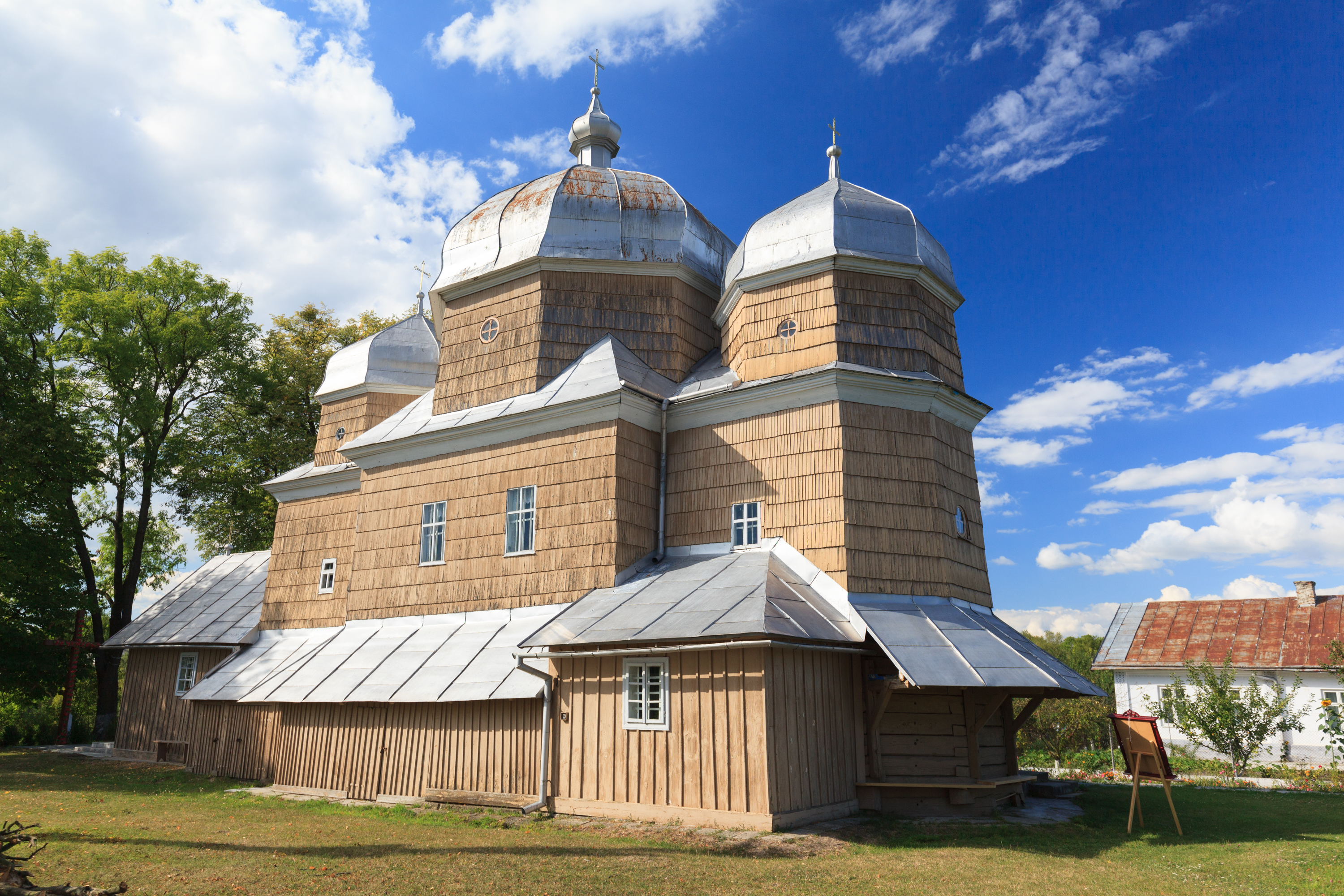 Церква Св. Іллі (дер.), Красне